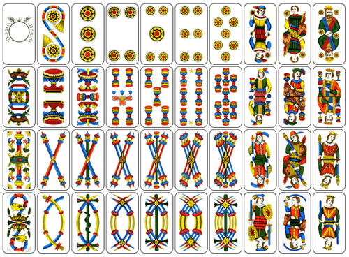 Carte primiera bolognese al completo